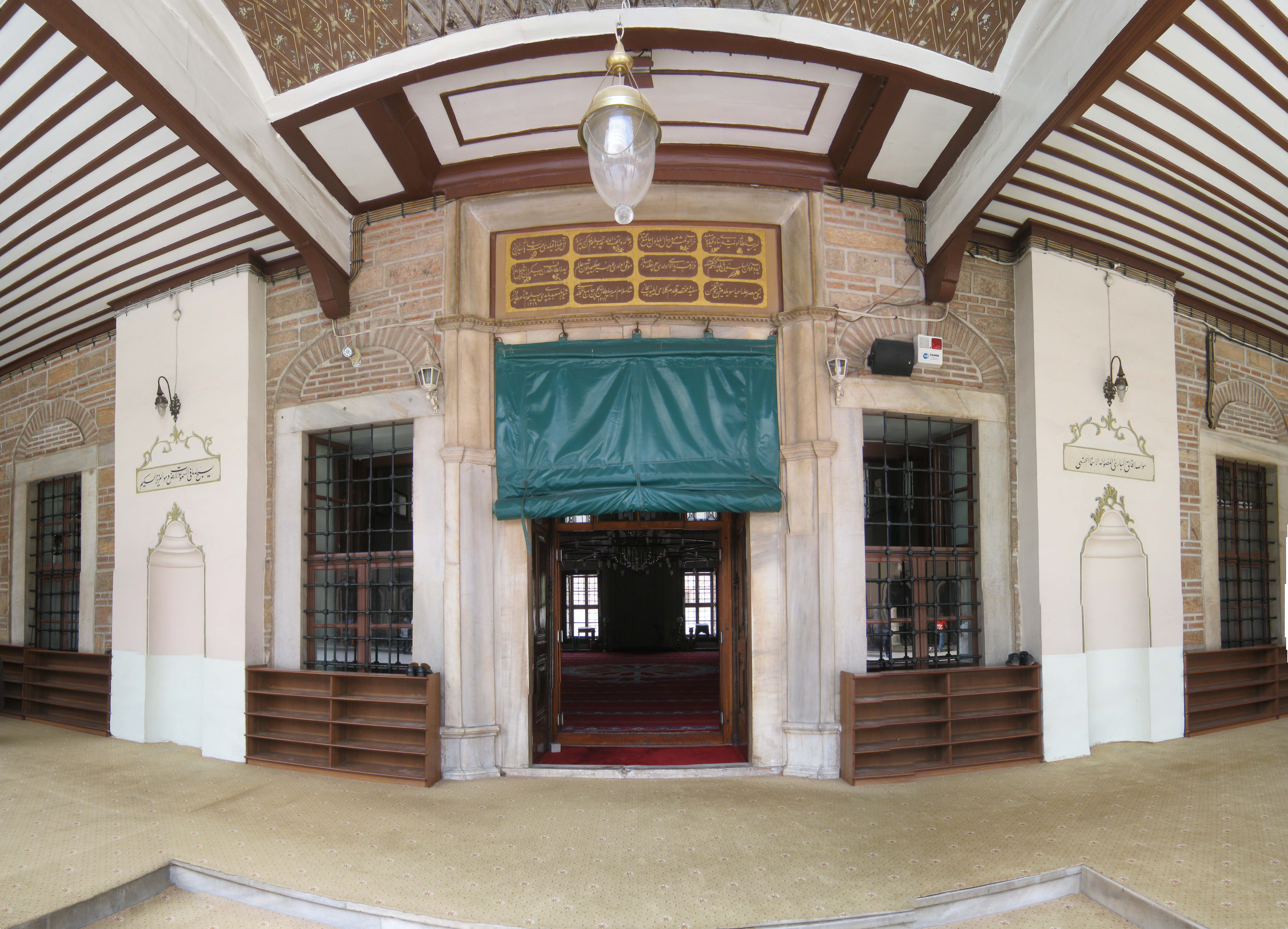 EMİRSULTAN CAMİİ BURSA CAMİ KİTABESİ